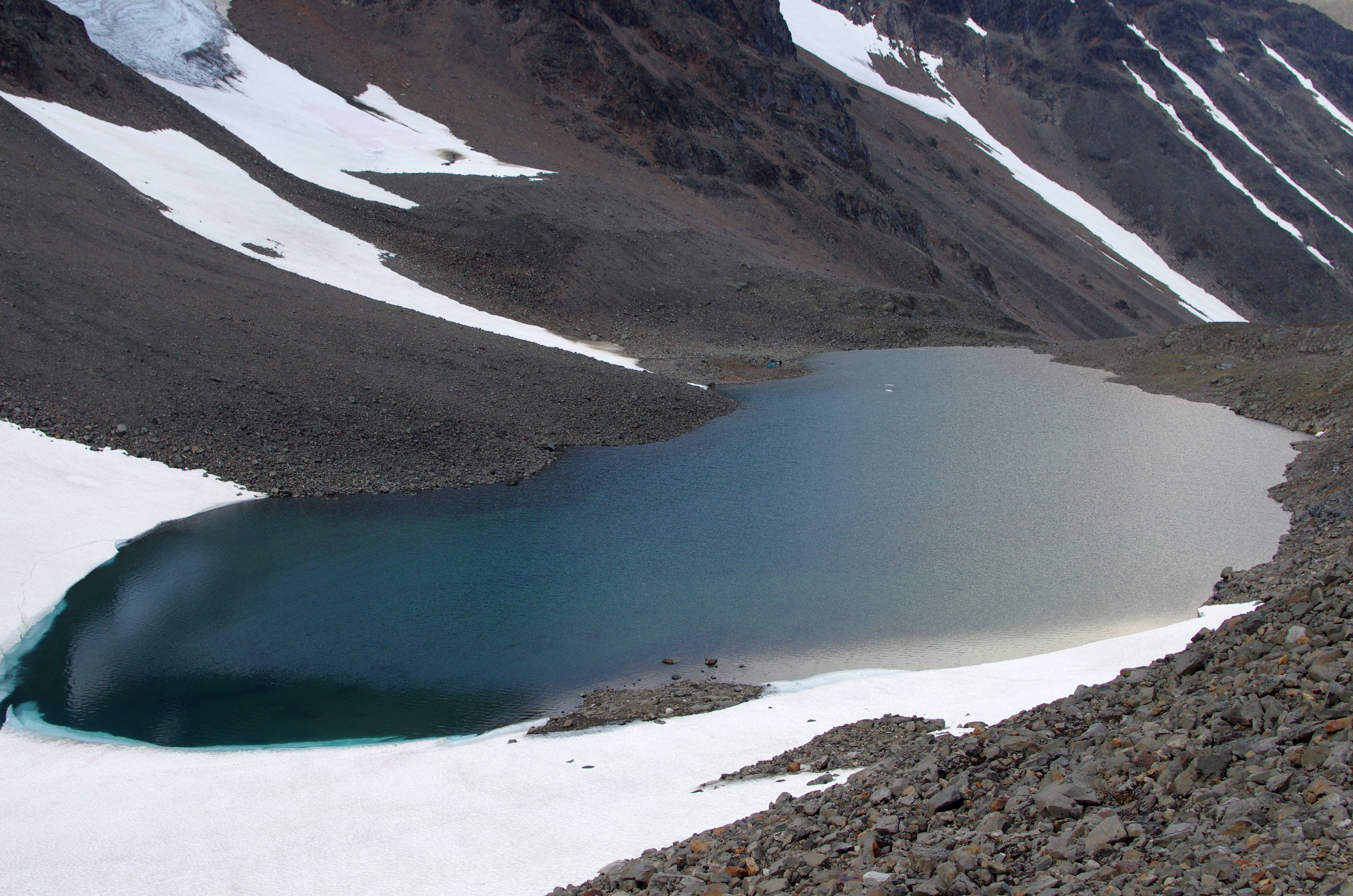 Gaskkasjárvi (Kaskasajaure)